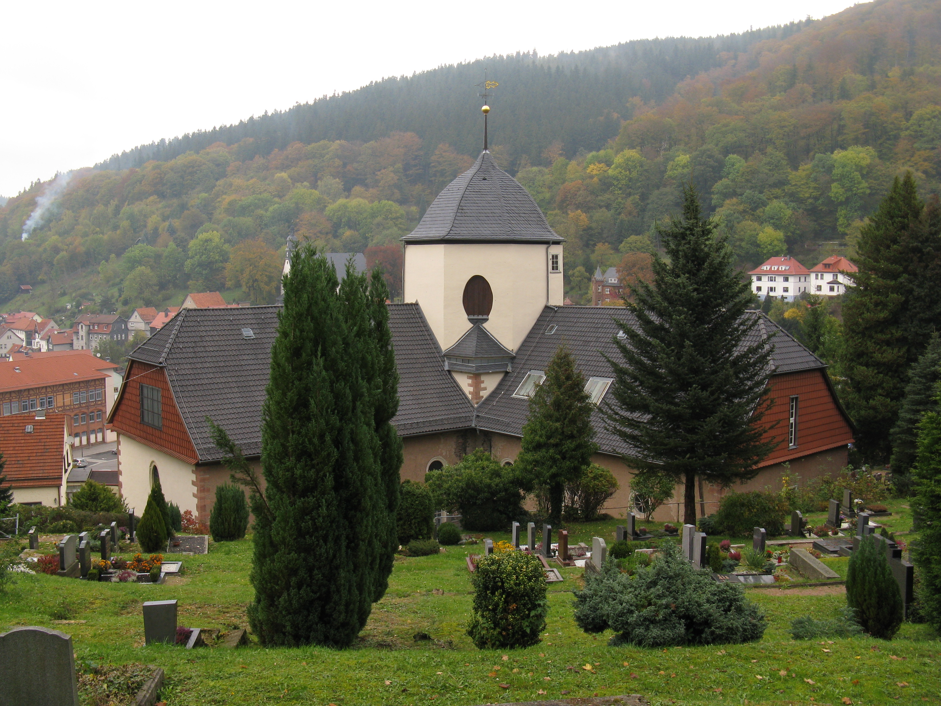 Kirche St. Concordia in Ruhla (Winkelkirche), Blick vom oberen Friedhof